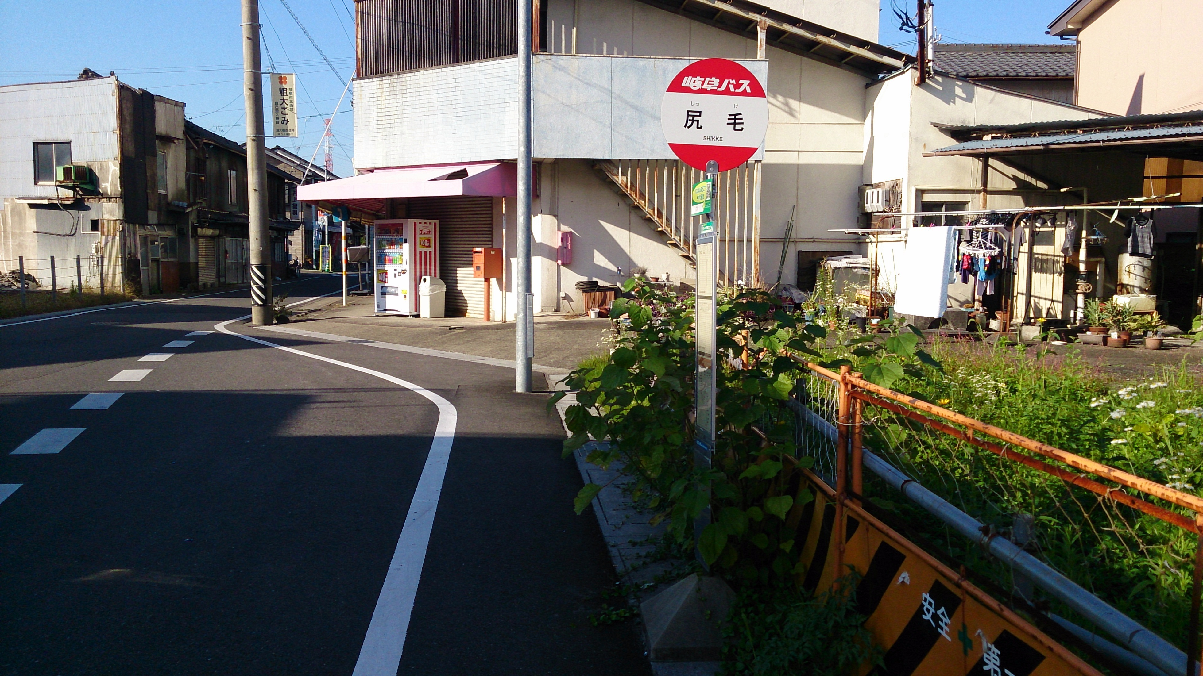 旧名鉄揖斐線・尻毛駅跡の東側の道路に設置。撮影時点では、岐阜バス・西郷線として運用していた。